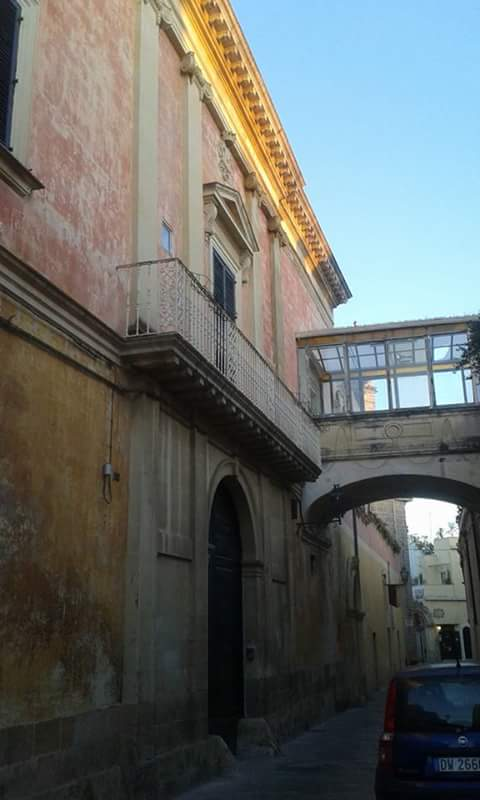 Palazzo De Pandi a Nardò (LE)-PUGLIA-ITALY